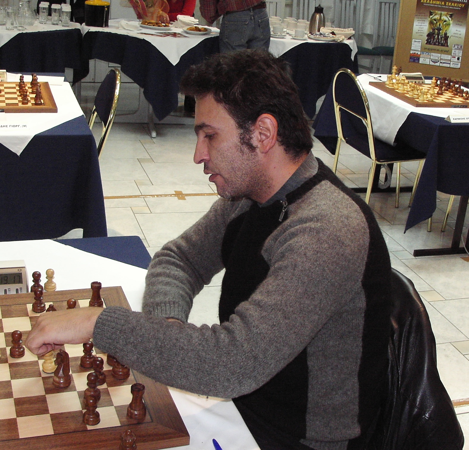 GM Ioannis Nikolaidis, Greece